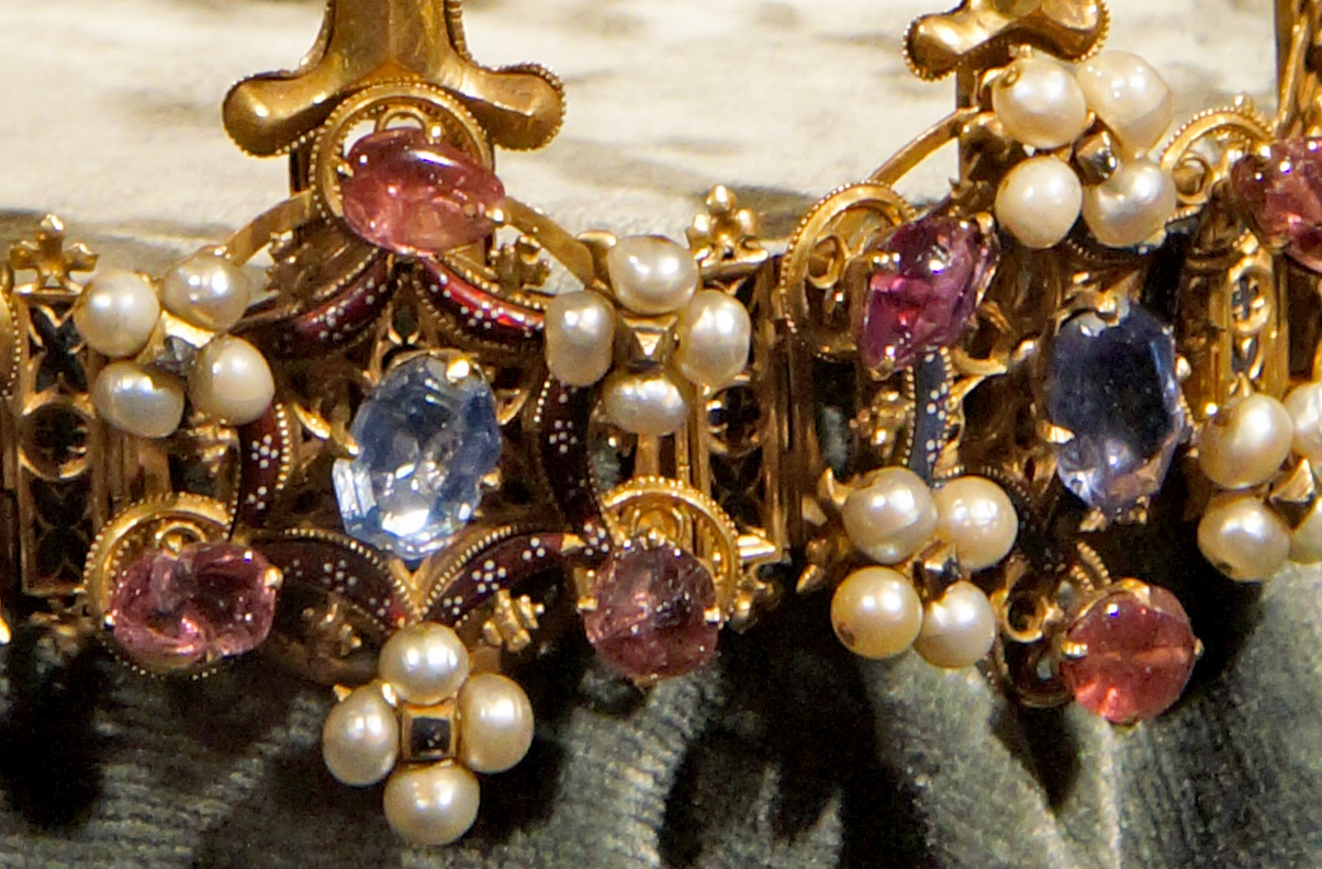 Die Schatzkammer in der Residenz (Stadtschloss) zu München